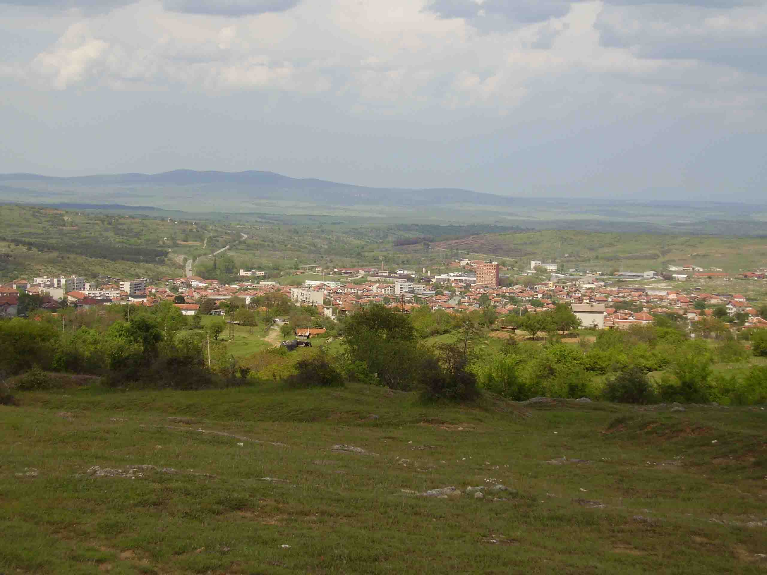 Изглед от Тополовград